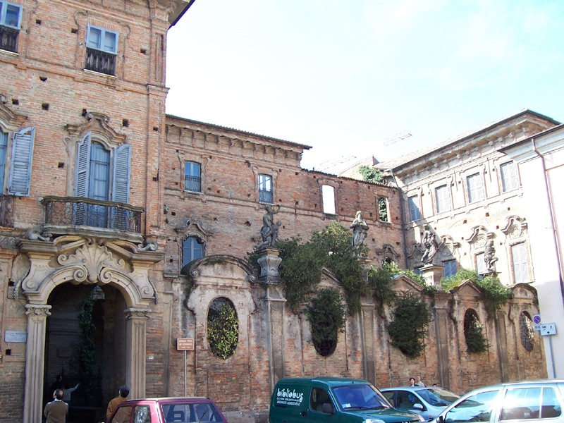 Crema - Palazzo Terni Gregori